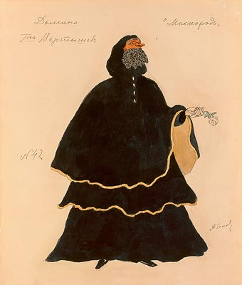 Эскиз к постановке драмы М. Лермонтова «Маскарад»